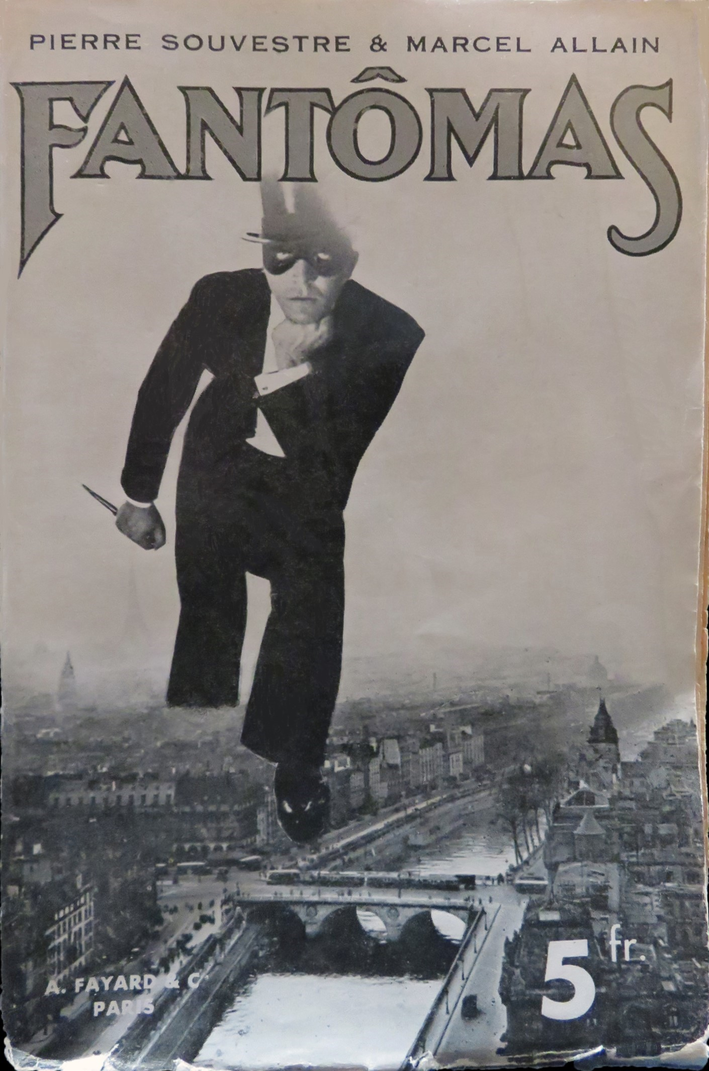 Couverture du premier volume de la série Fantômas par Pierre Souvestre et Marcel Allain, Paris, éditions Fayard, 1911. Illustration anonyme.